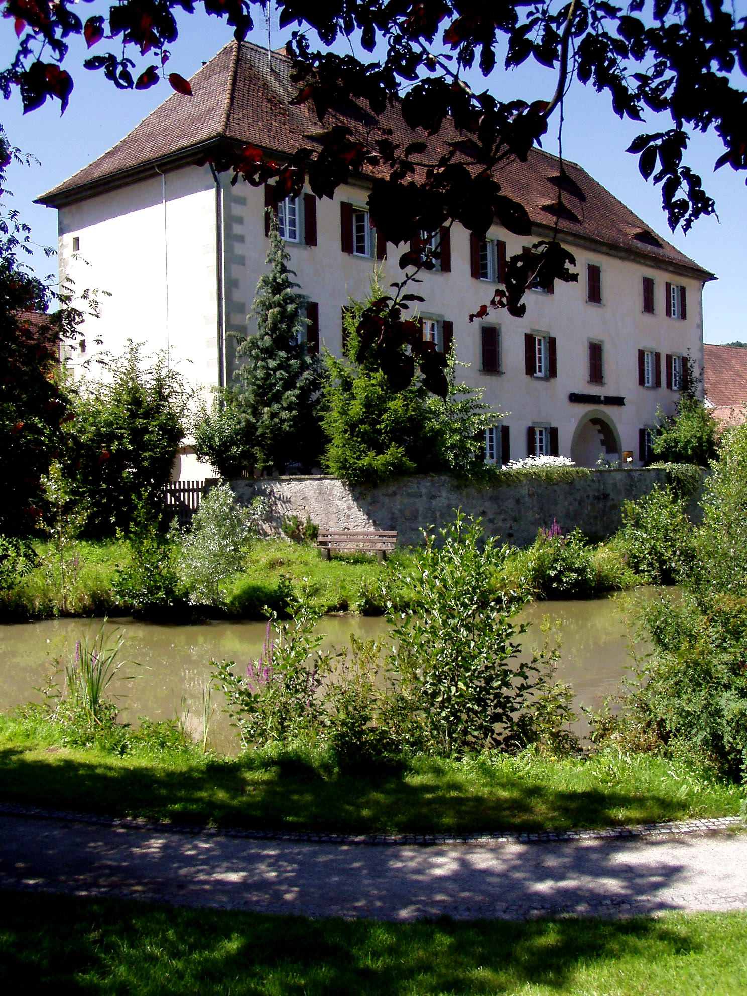 Das Fürstlich Castellsche Schloss in Burghaslach